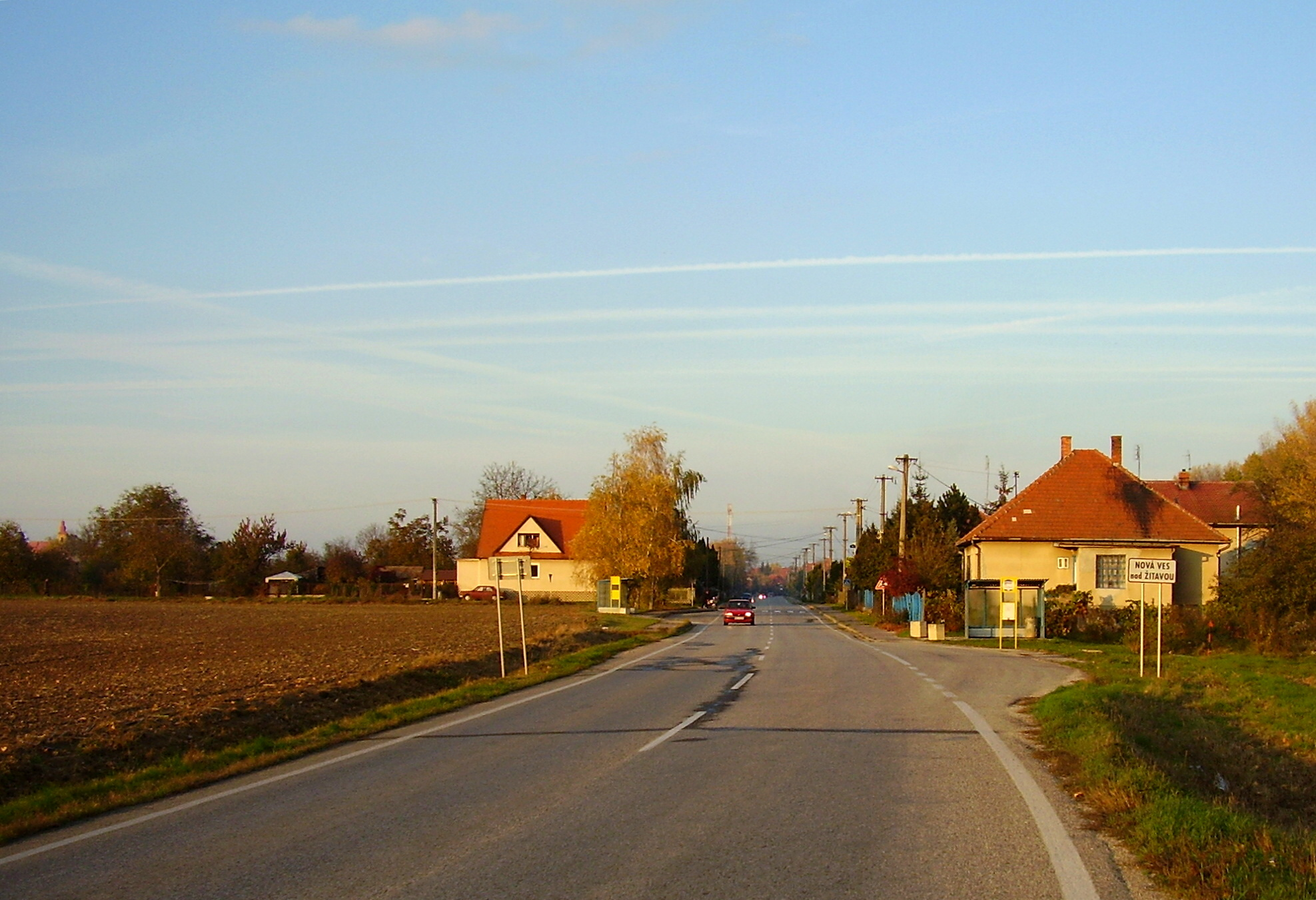 Obec Nová Ves nad Žitavou